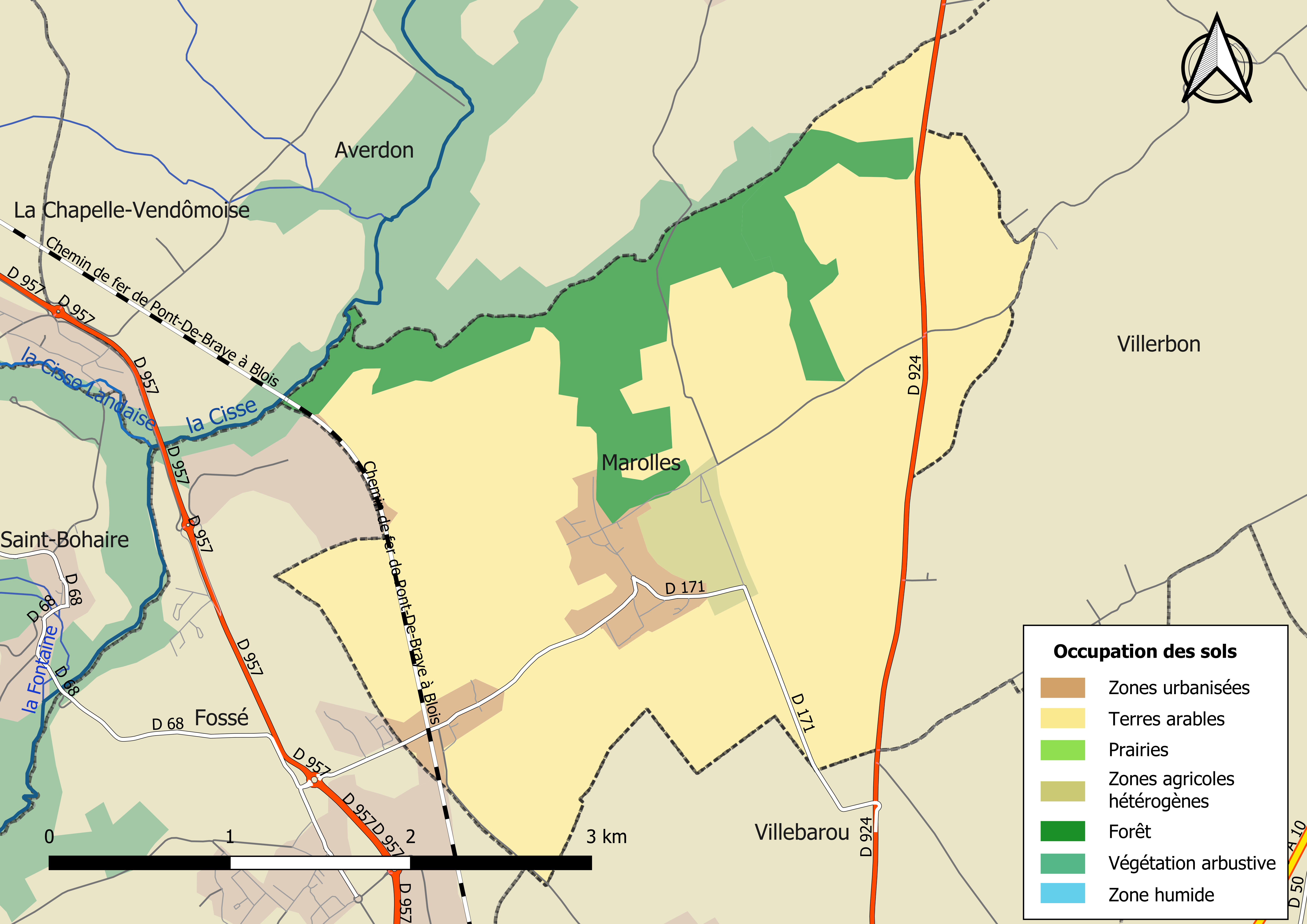 Carte des infrastructures et de l’occupation des sols en 2018 de la commune de Marolles (Loir-et-Cher) (France).